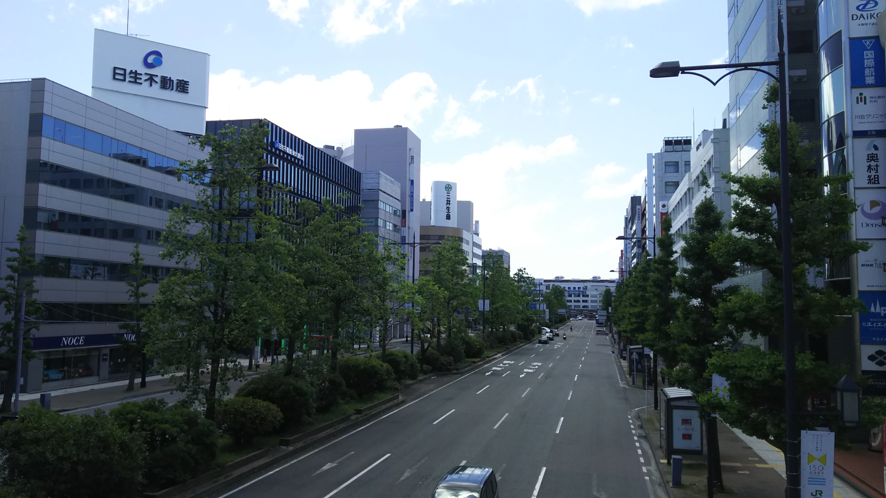 新潟市東大通り